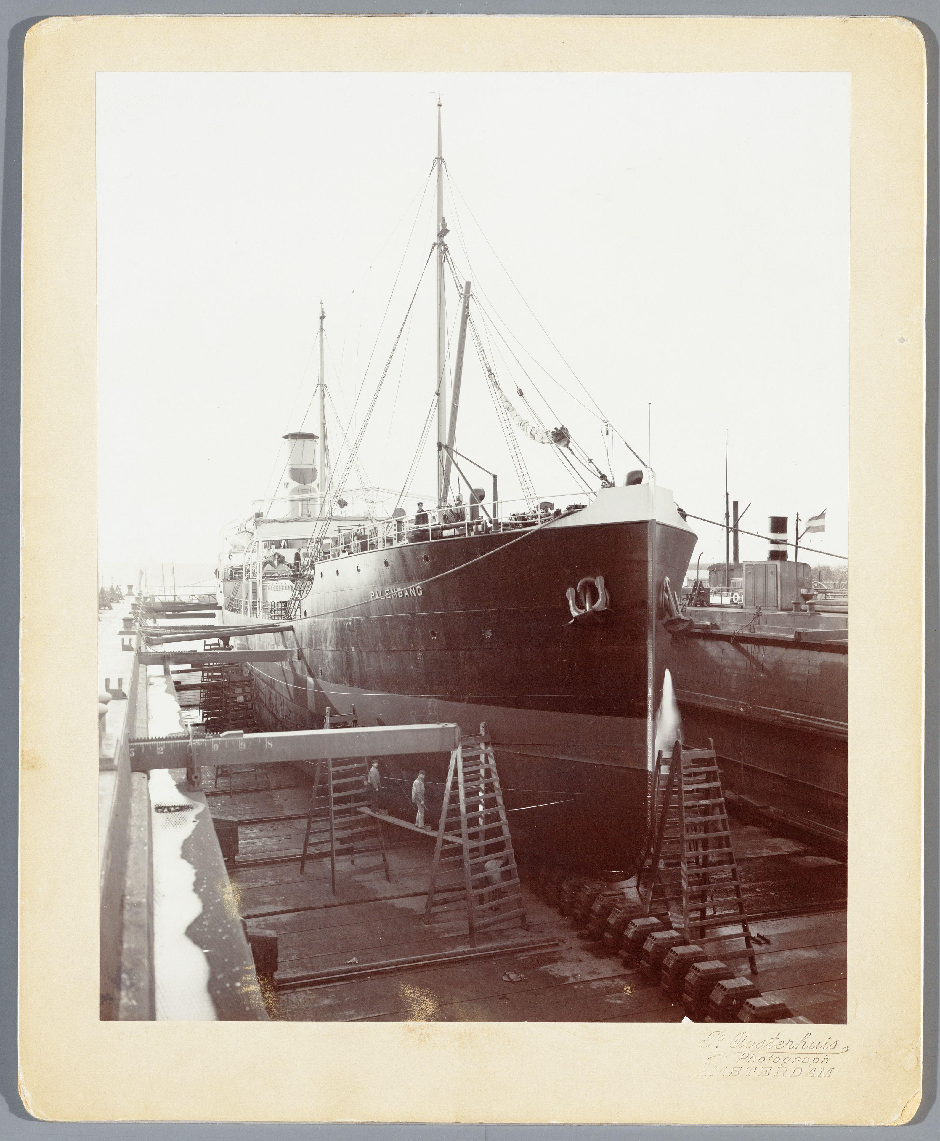 Beschrijving Het tankschip Palembang in een droogdok van de Amsterdamsche Droogdok Maatschappij (A.D.M.) Bouwnummer 63, gebouwd op de werf van de Nederlandsche Scheepsbouw Maatschappij in opdracht van de Koninklijke Maatschappij tot Exploitatie van Petroleumbronnen. Het schip, kort voor haar vertrek naar Nederlands-Indië, gezien van het terrein van de A.D.M., Meeuwenlaan 42, over het IJ in de richting van het Centraal Station. In 1931 werd dit schip voor sloop naar Japan verkocht. Documenttype foto Vervaardiger Oosterhuis, Gustaaf (1858-1938) Collectie Archief Nederlandse Dok- en Scheepsbouw Mij.: foto's Datering 1905 Geografische naam Meeuwenlaan IJ Inventarissen Afbeeldingsbestand 010179000021 Generated with Dememorixer